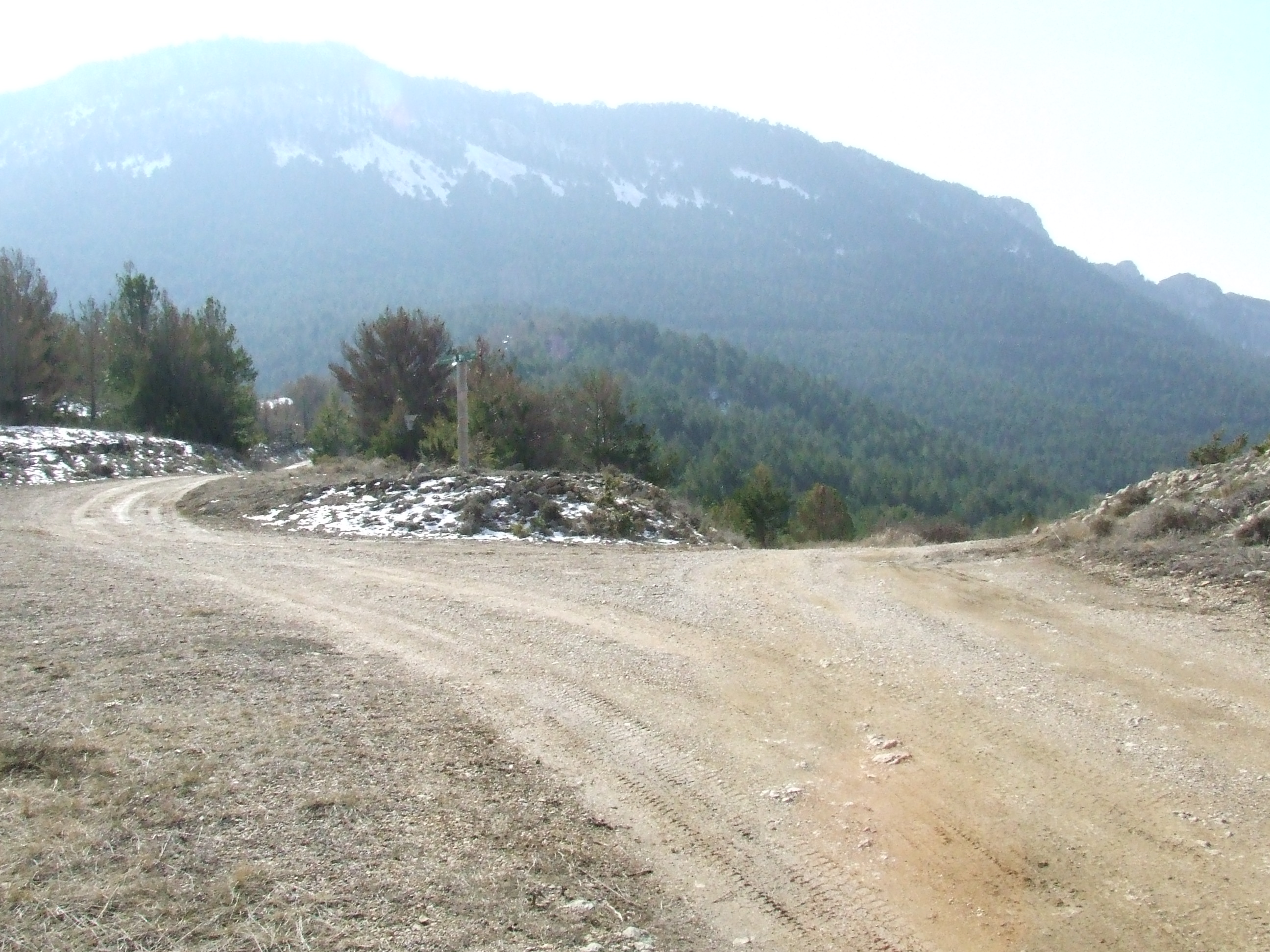 La Colla de la Serra del Pi, la Carretera del Bosc d'Abella i la Pista de Carrànima (Bóixols, Abella de la Conca, Pallars Jussà)